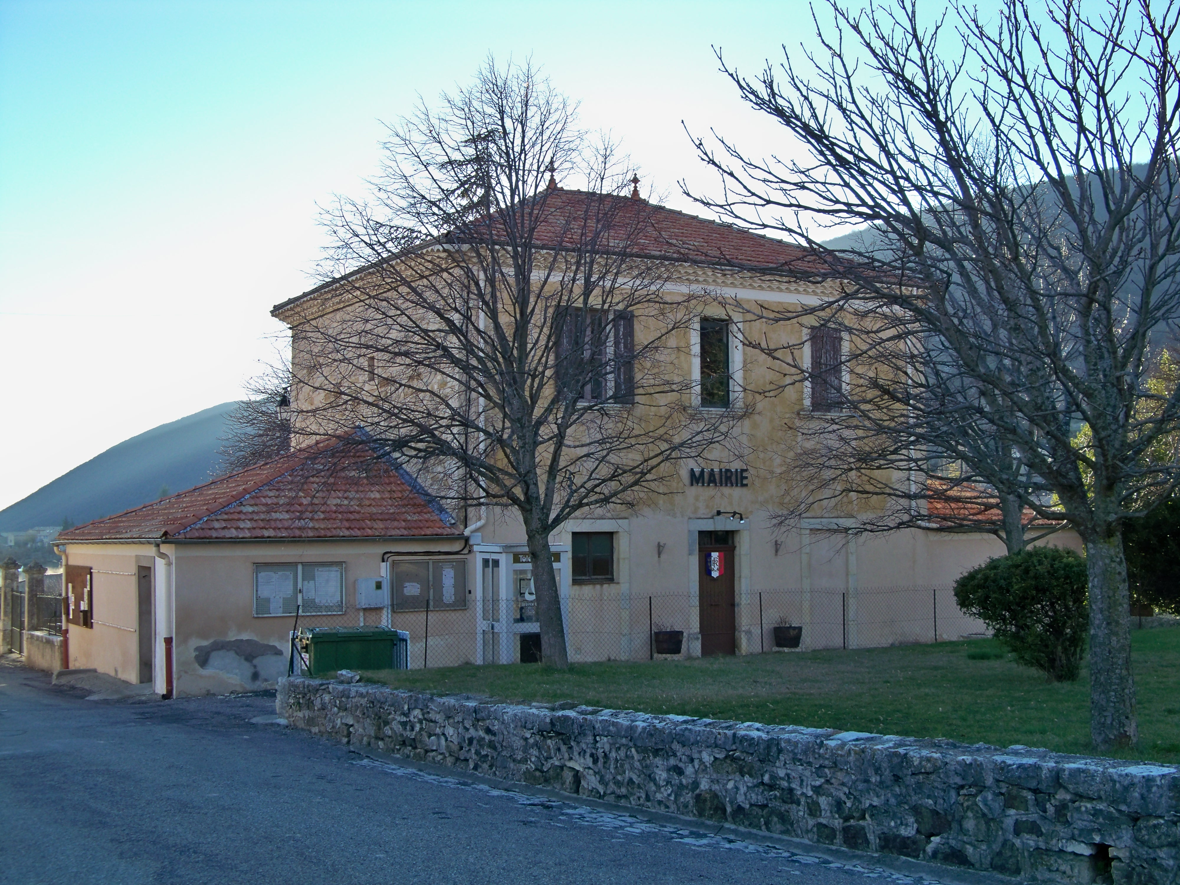 Mairie de La Rochegiron (04), France